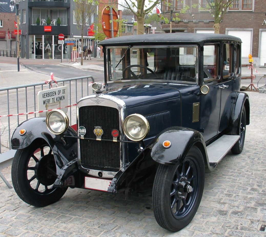 Austin 16 Berkeley 1930-1932